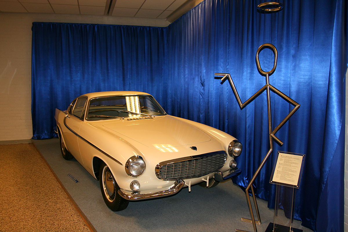 Volvo P 1800 1961, Volvo museum.